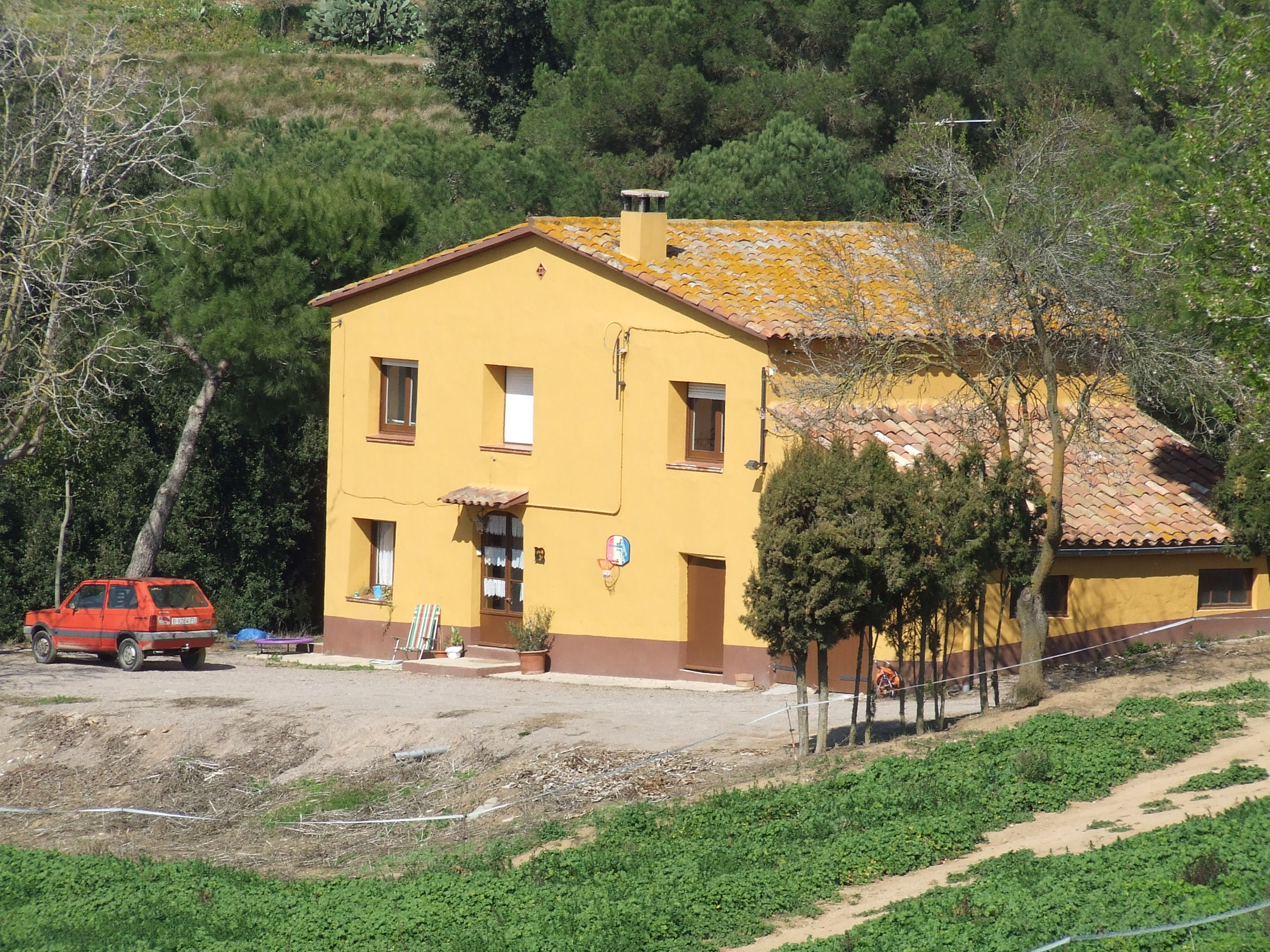 Can Petrallos (Bigues, Bigues i Riells, Vallès Oriental)